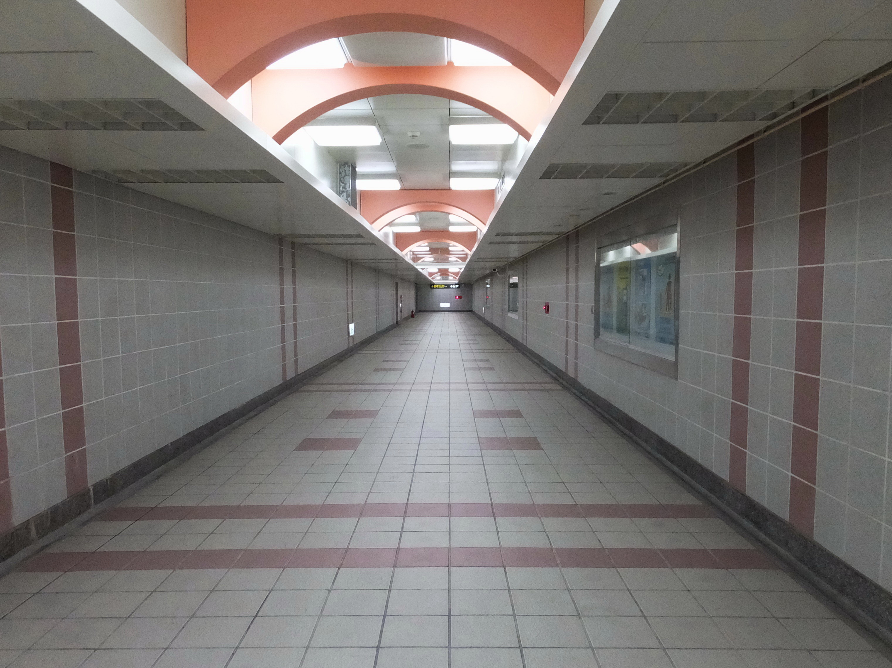 MRT Daqiaotou Station 捷運大橋頭站